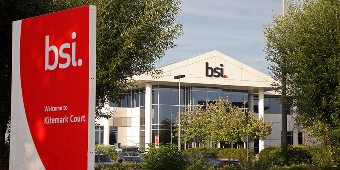 Hauptsitz BSI Group